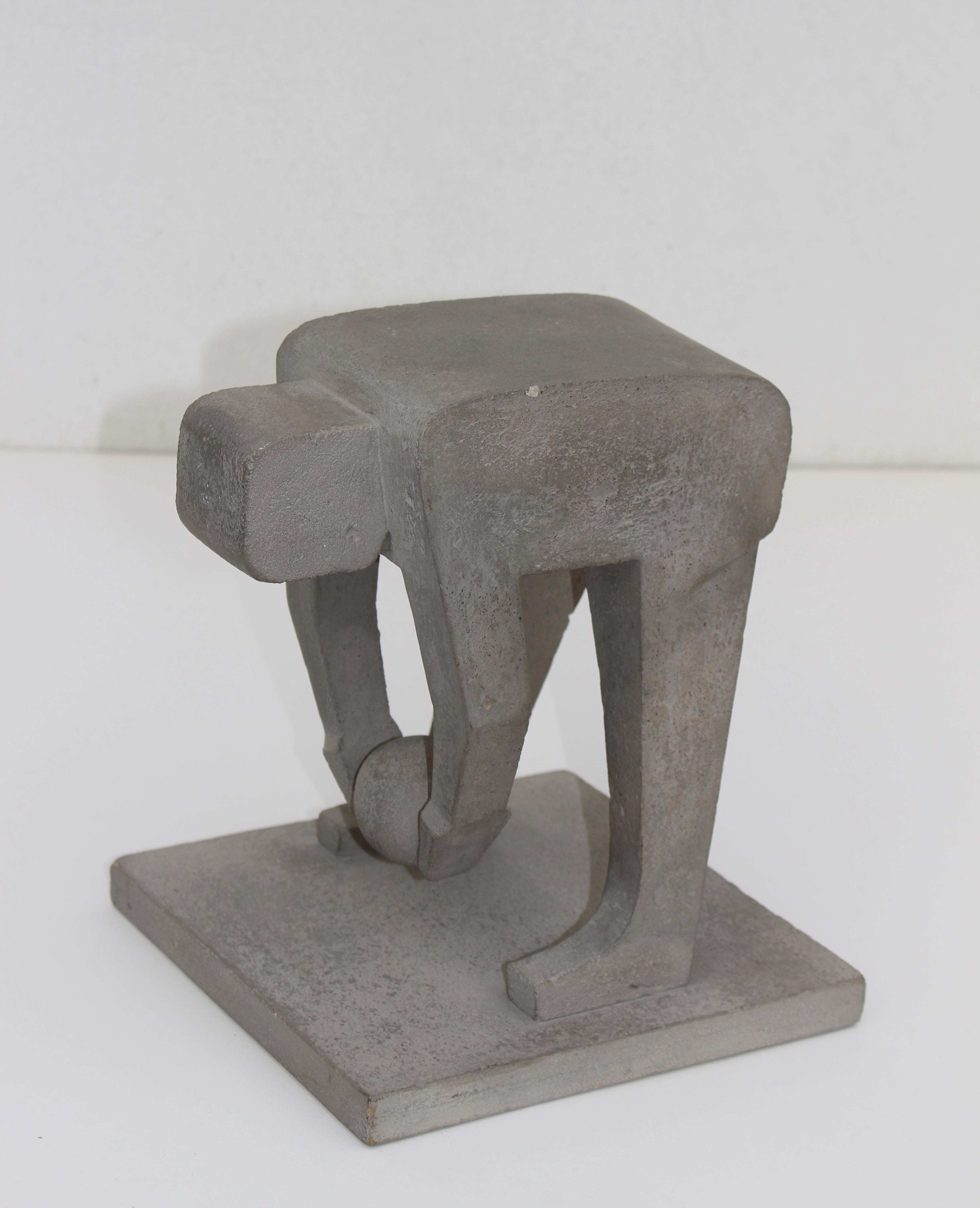 Statuette mit abstrahierter Ballspielerin aus Beton